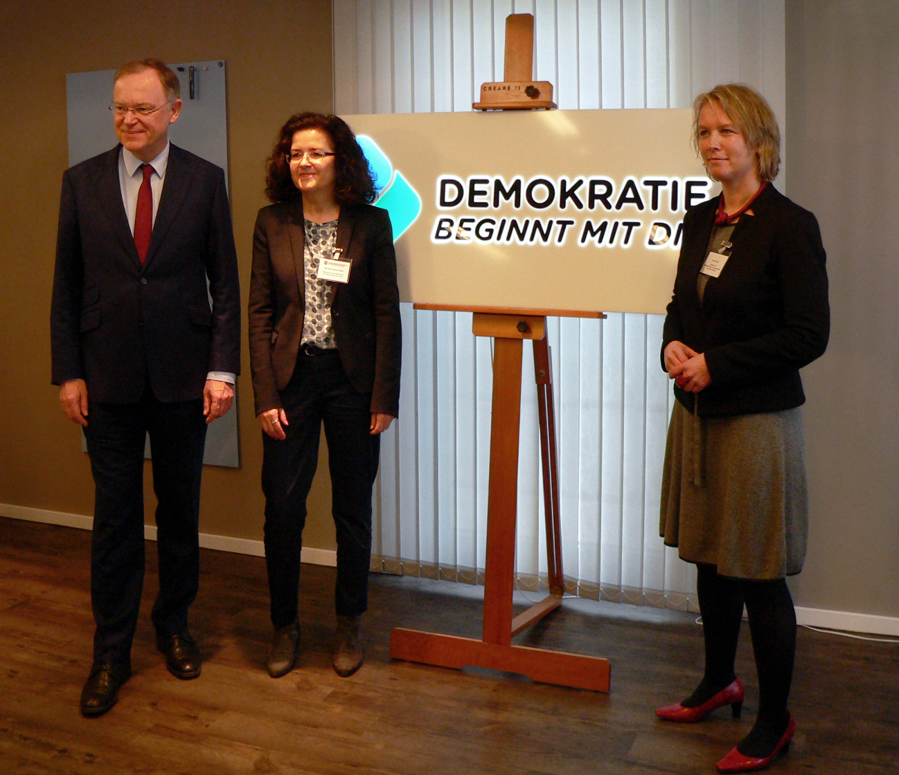 Einweihung der Niedersächsischen Landeszentrale für politische Bildung